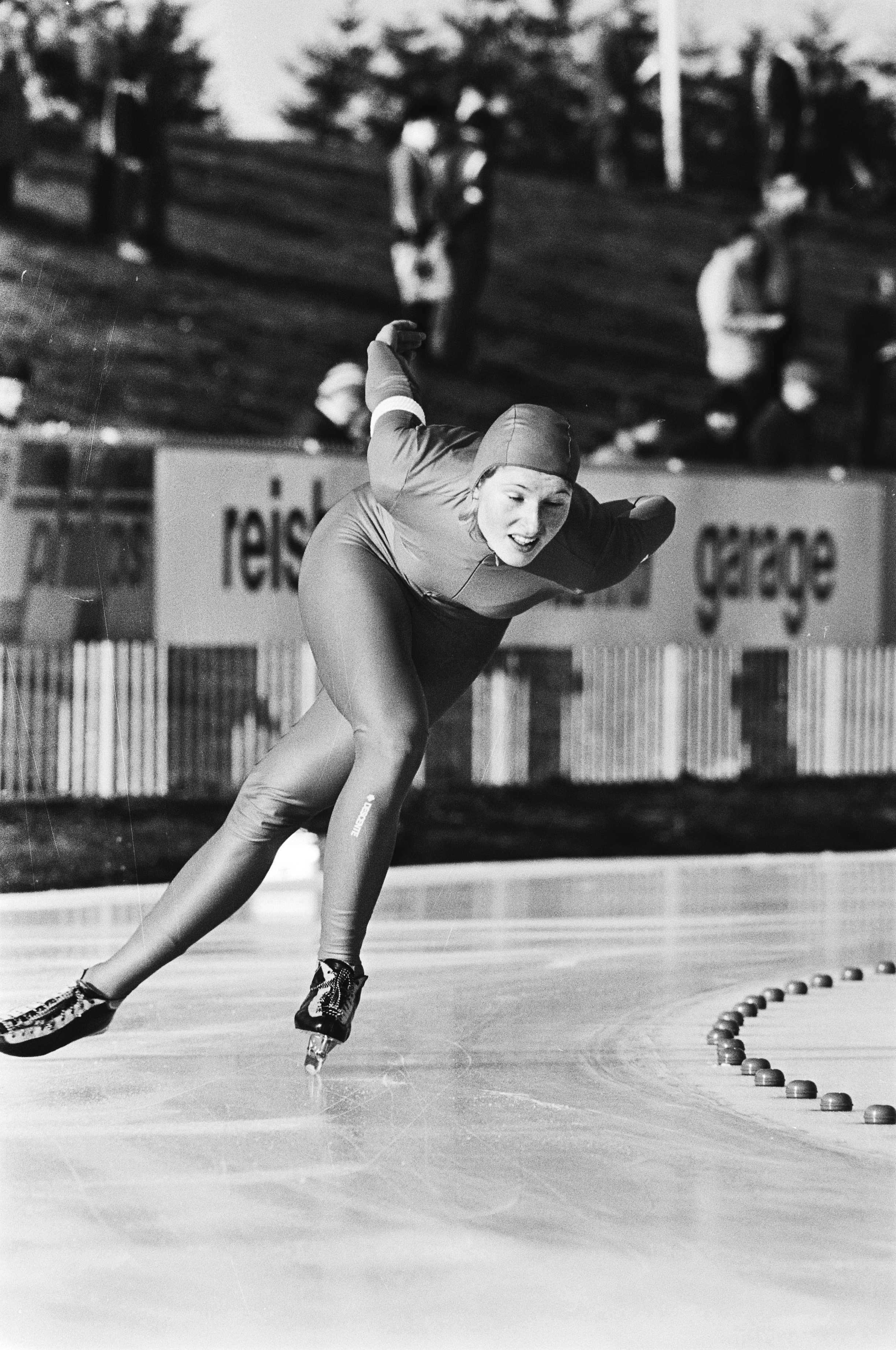 Collectie / Archief : Fotocollectie Anefo Reportage / Serie : [ onbekend ] Beschrijving : Wereldkampioenschappen schaatsen junioren allround in Assen. Bjorg Eva Jensen (Noorwegen) in actie. Datum : 26 januari 1980 Locatie : Assen Trefwoorden : schaatsen, sport Persoonsnaam : Jensen Bjorg Eva Fotograaf : Suyk, Koen / Anefo Auteursrechthebbende : Nationaal Archief Materiaalsoort : Negatief (zwart/wit) Nummer archiefinventaris : bekijk toegang 2.24.01.05 Bestanddeelnummer : 930-6402